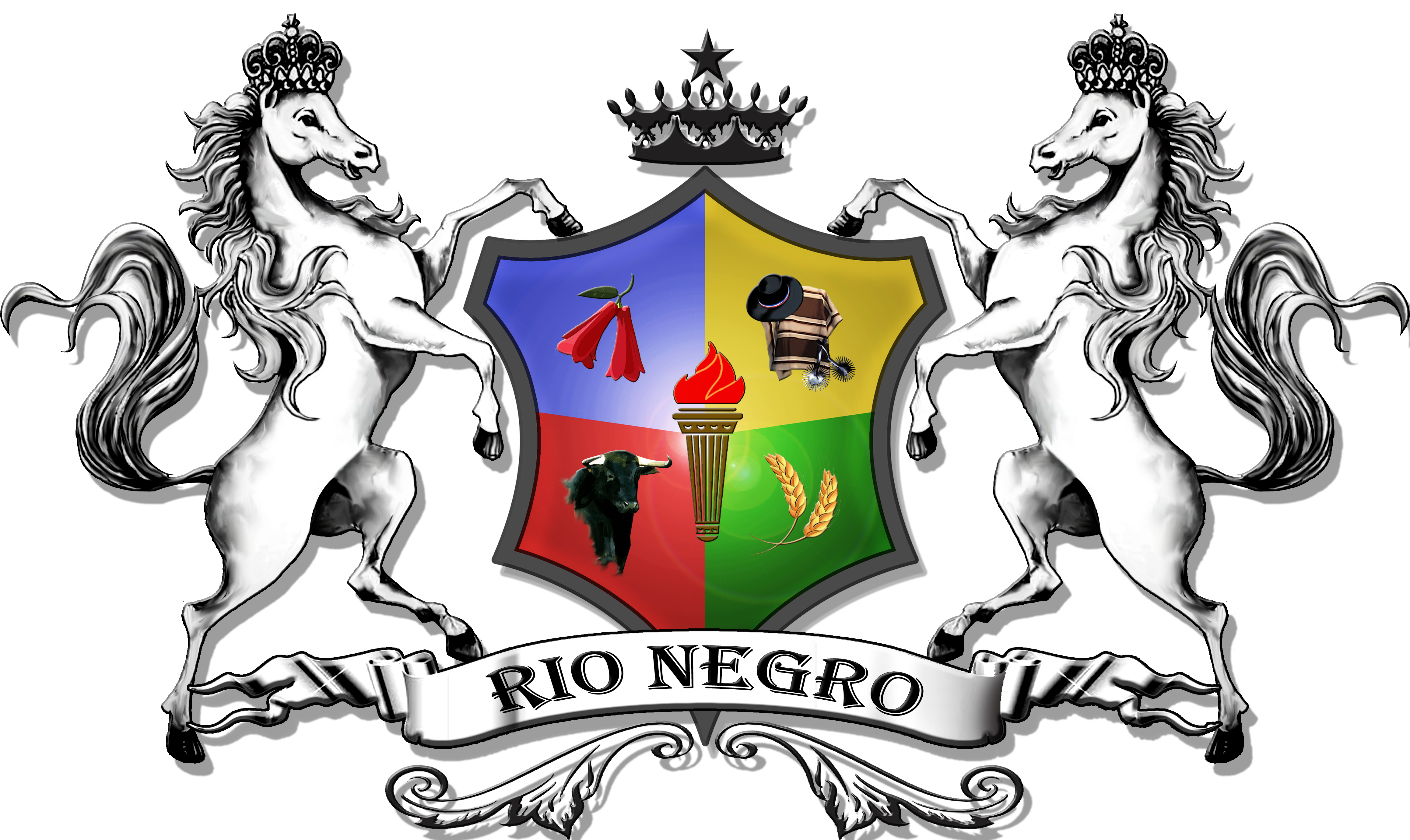 Coat of Arms, Black River commune , Region of Los Lagos , Chile